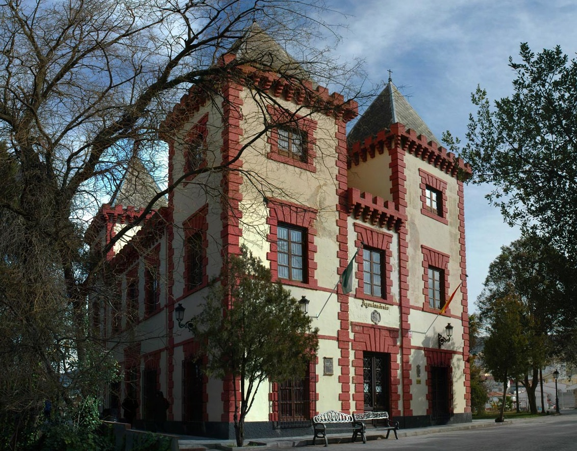 Ayuntamiento de Deifontes (Granada, España)